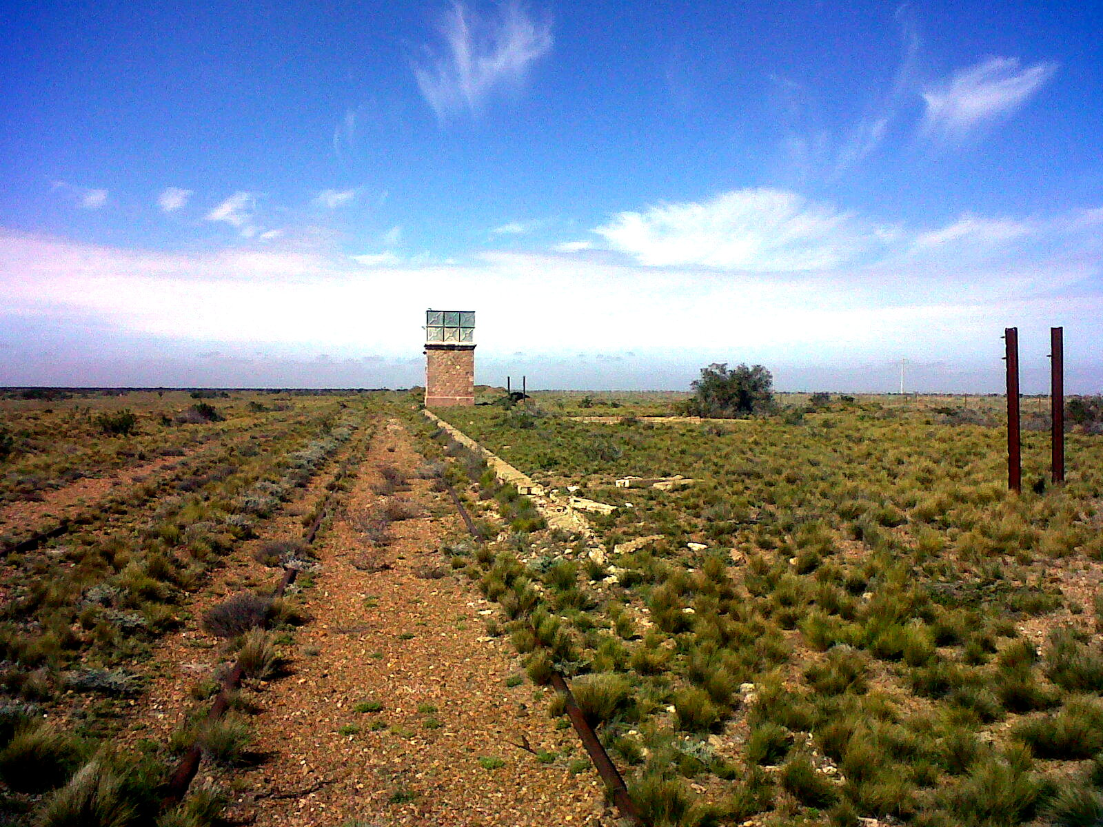 Restos de las instalaciones ferroviarias en Minerales